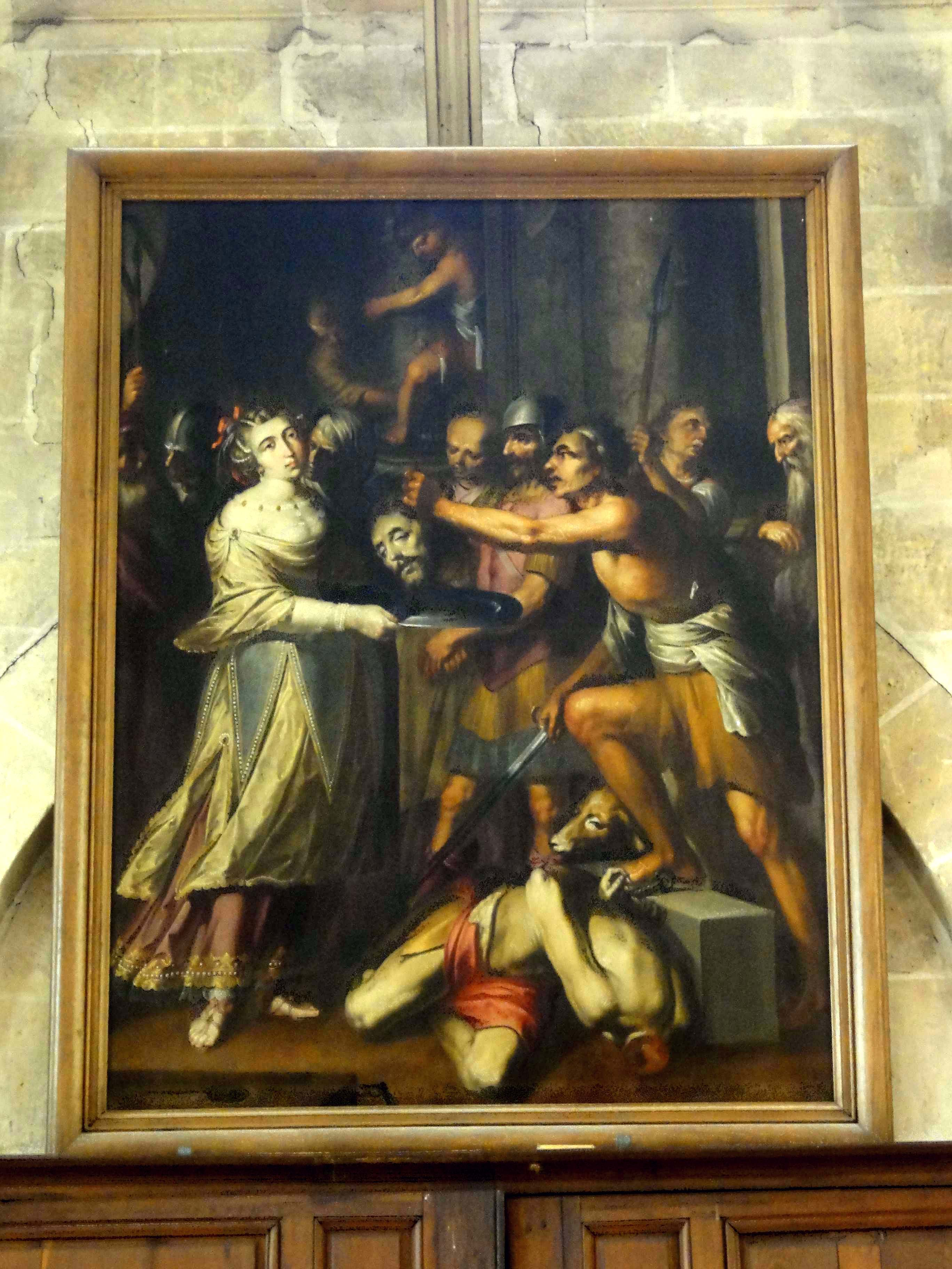 Décollation de saint Jean-Baptiste,label QS:Lfr,"décollation de saint Jean-Baptiste,"